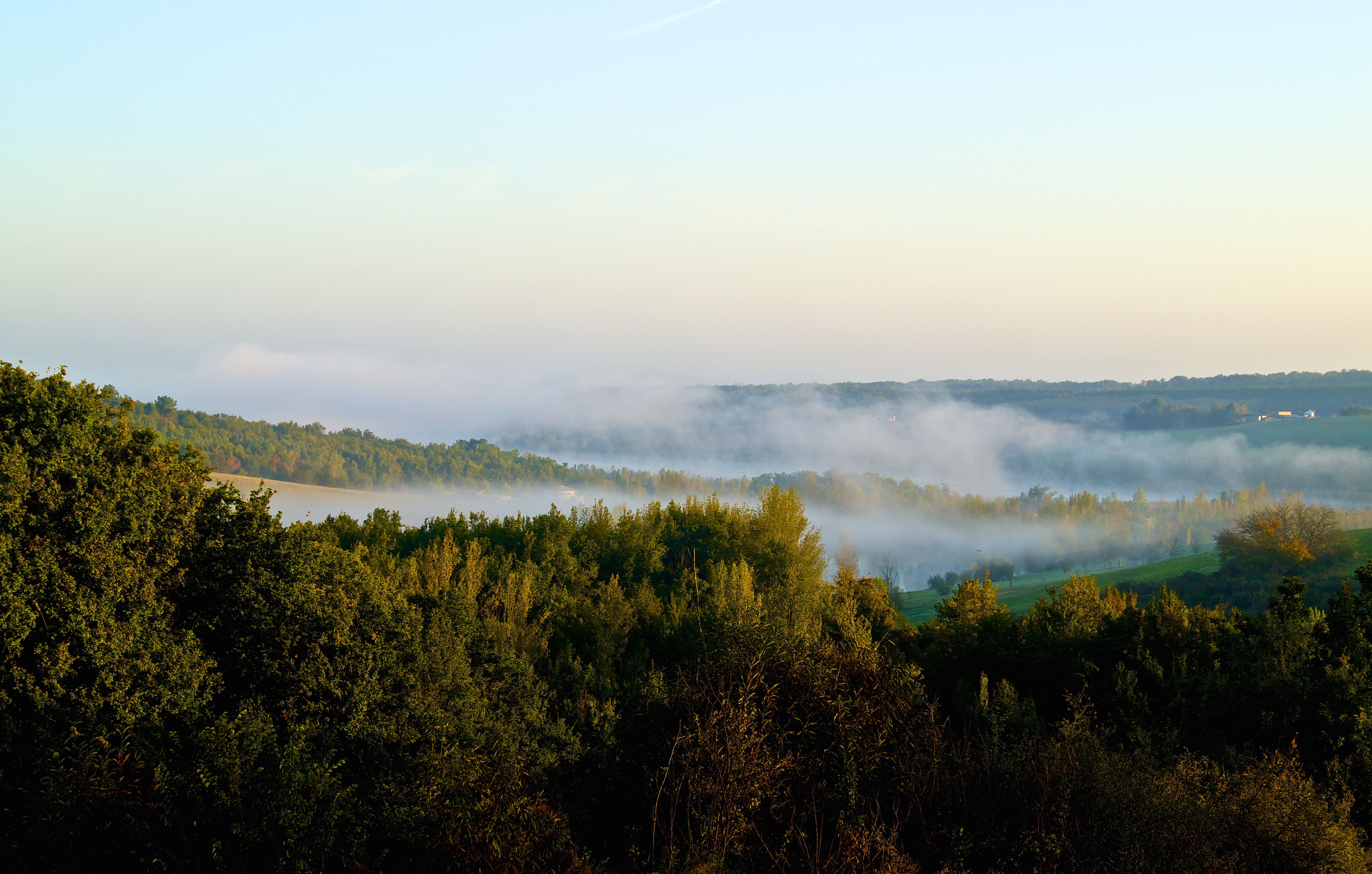 Brume au dessus du lac de Léojac